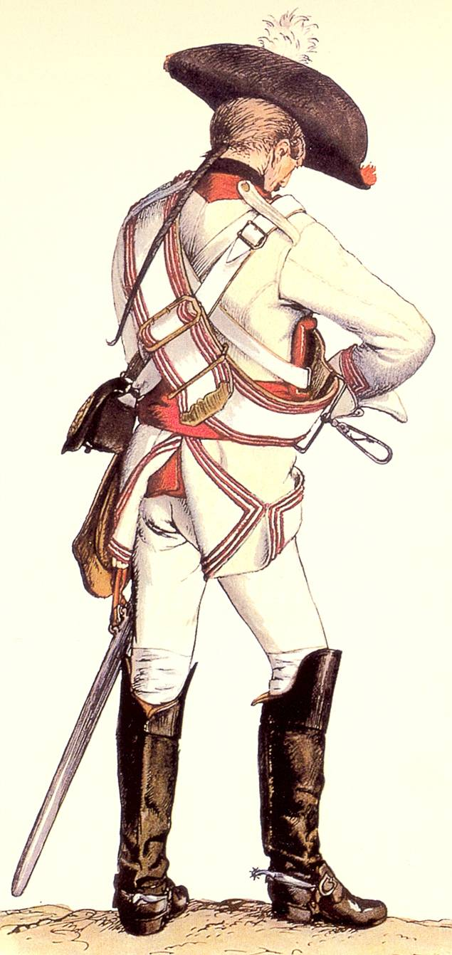 Reiter des preuß. Kürassier-Regiments Prinz Schönaich